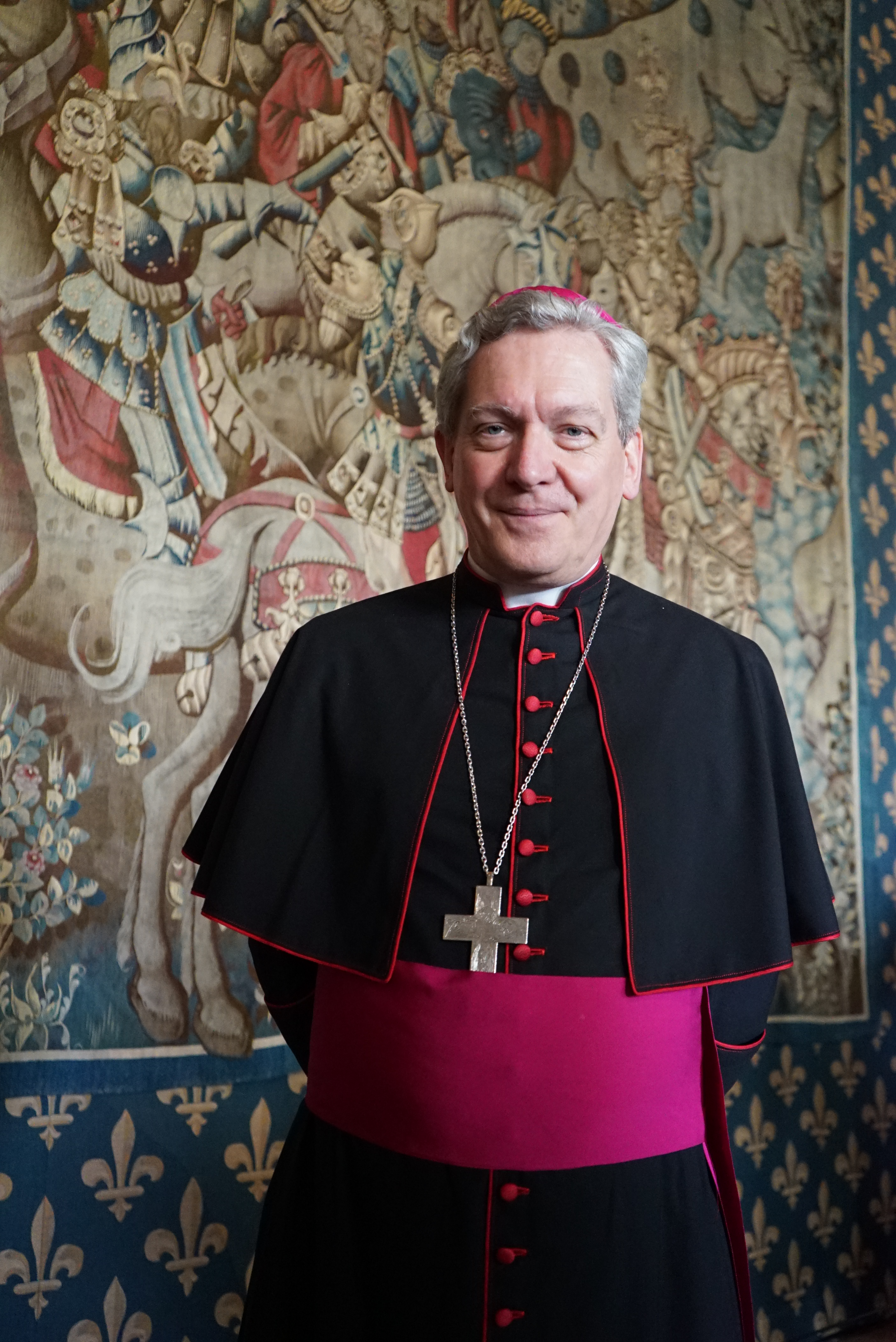 lors des Fête Jehanne d'Arc 2016.